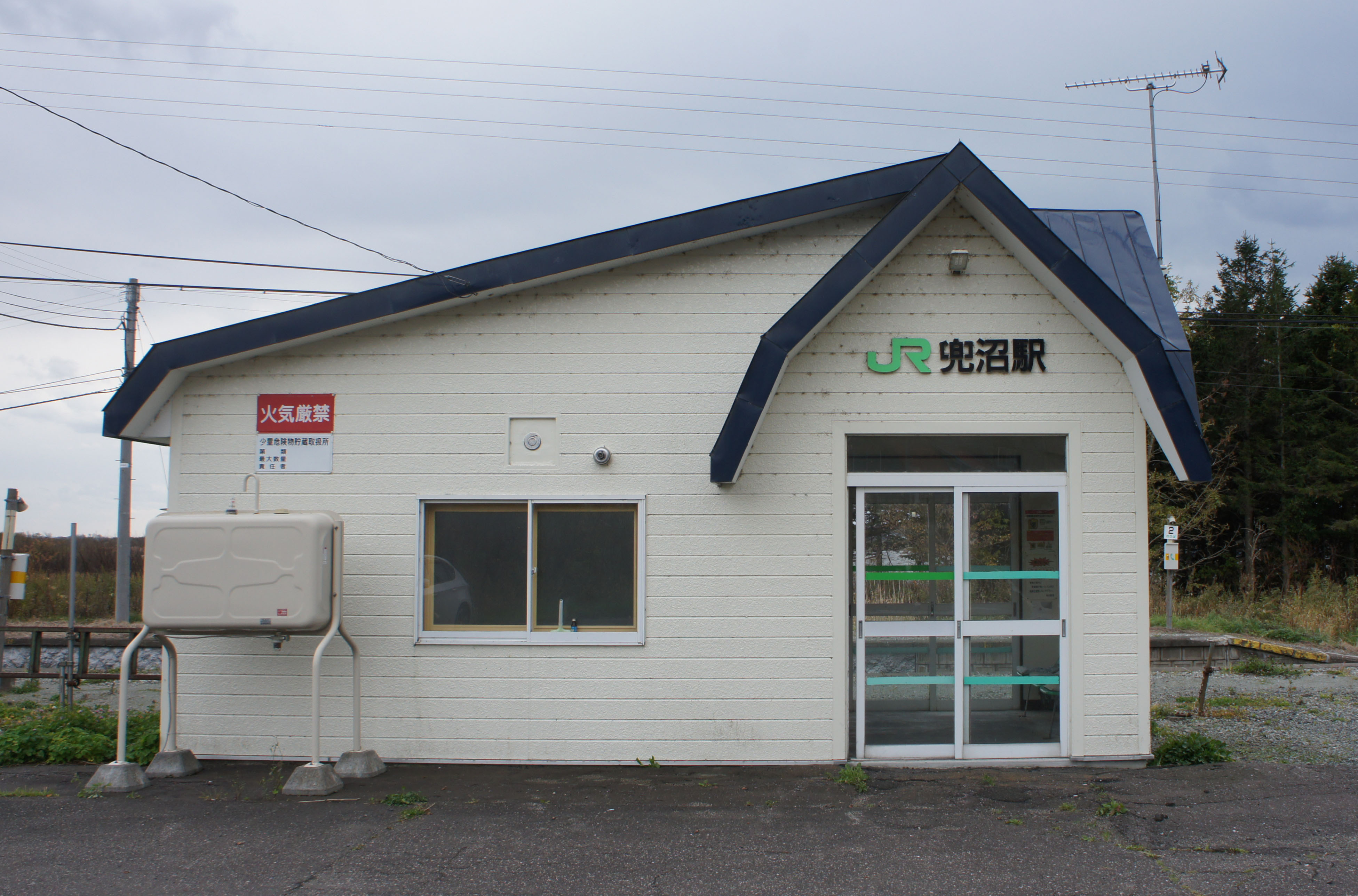 JR宗谷本線・兜沼駅の駅舎 Sony NEX-3